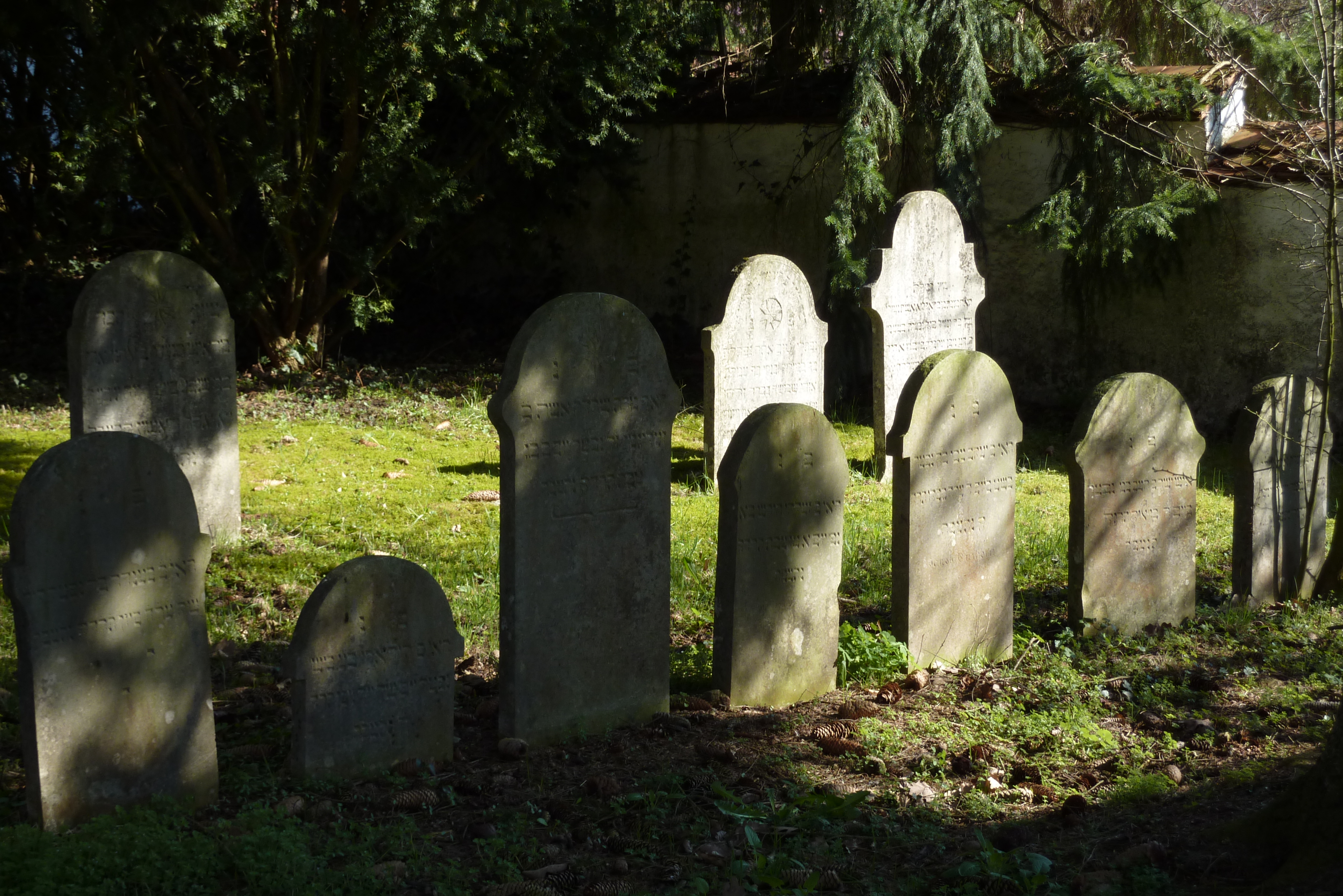 Jüdischer Friedhof in Buttenwiesen, Ansicht